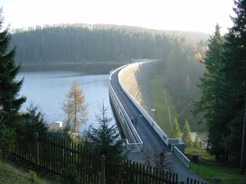 Saidenbach dam in Germany